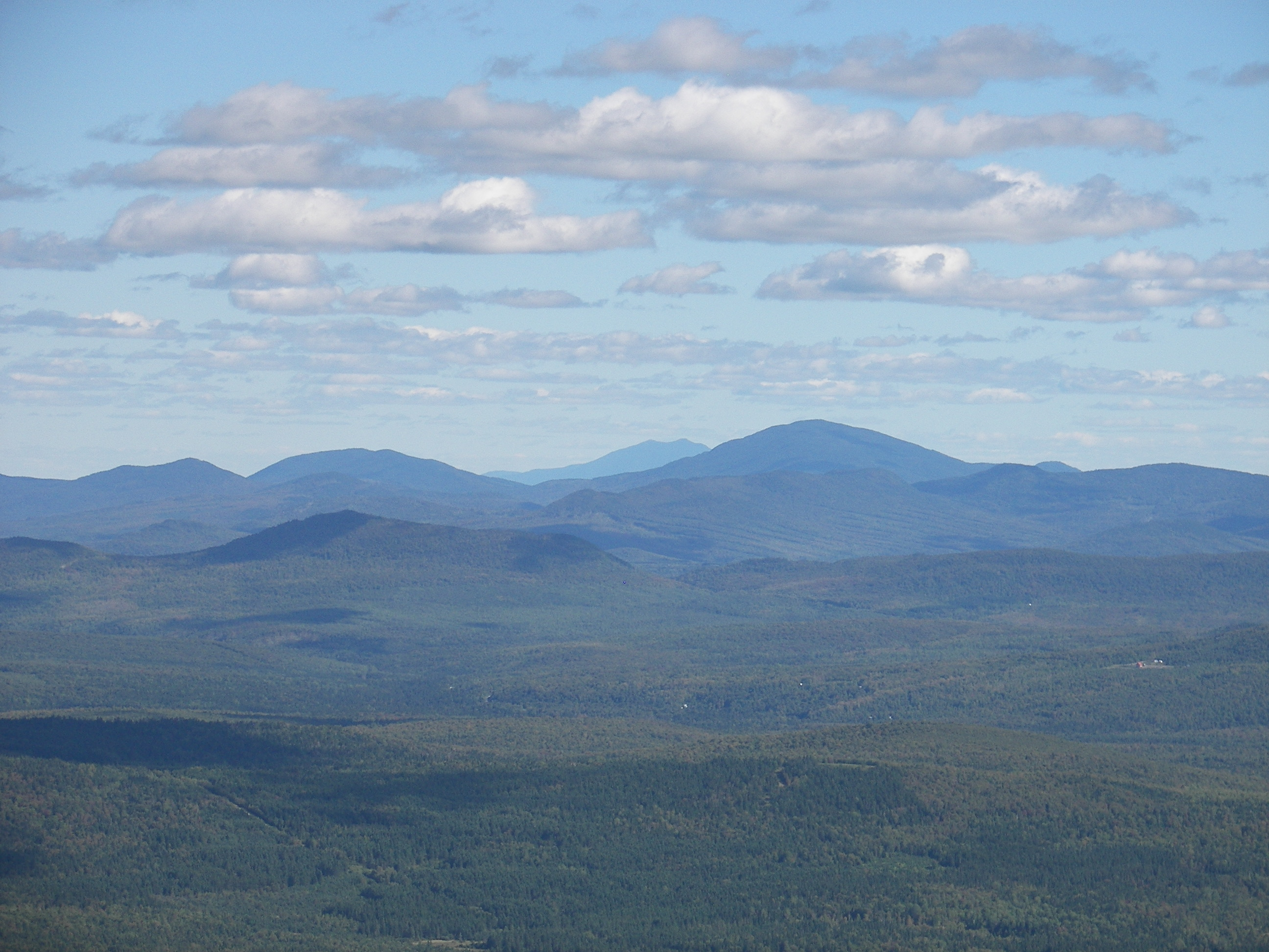 Frontiere des Appalaches entre Québec et U.S.A. vue du sommet du Mont Mégantic. Les deux crêtes de Bigelow Range sont visibles au centre à l'arrierre plan.